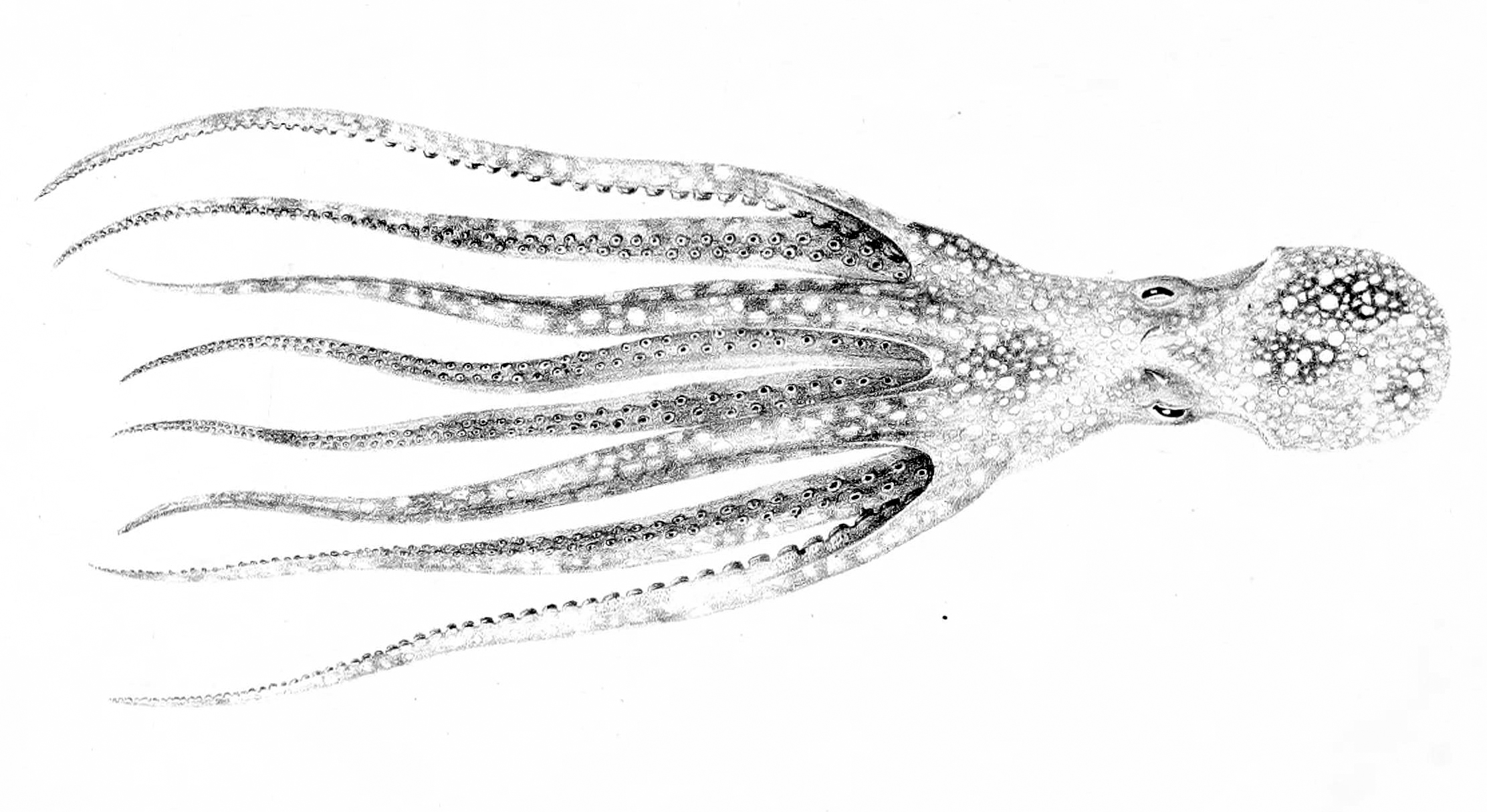 Octopus salutii